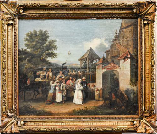 Scena rodzajowa (wesele chłopskie)